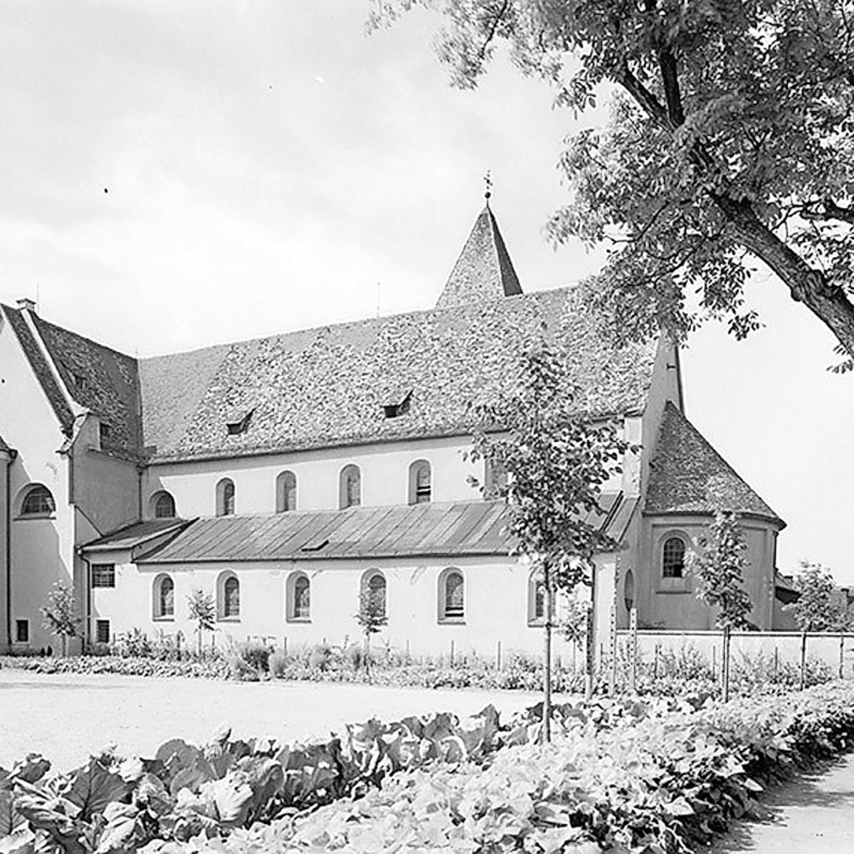 Die Obermünsterkirche in Regensburg um 1925. Bild aus dem Plan- und Bildarchiv am Landesamt für Denkmalschutz Bayern.